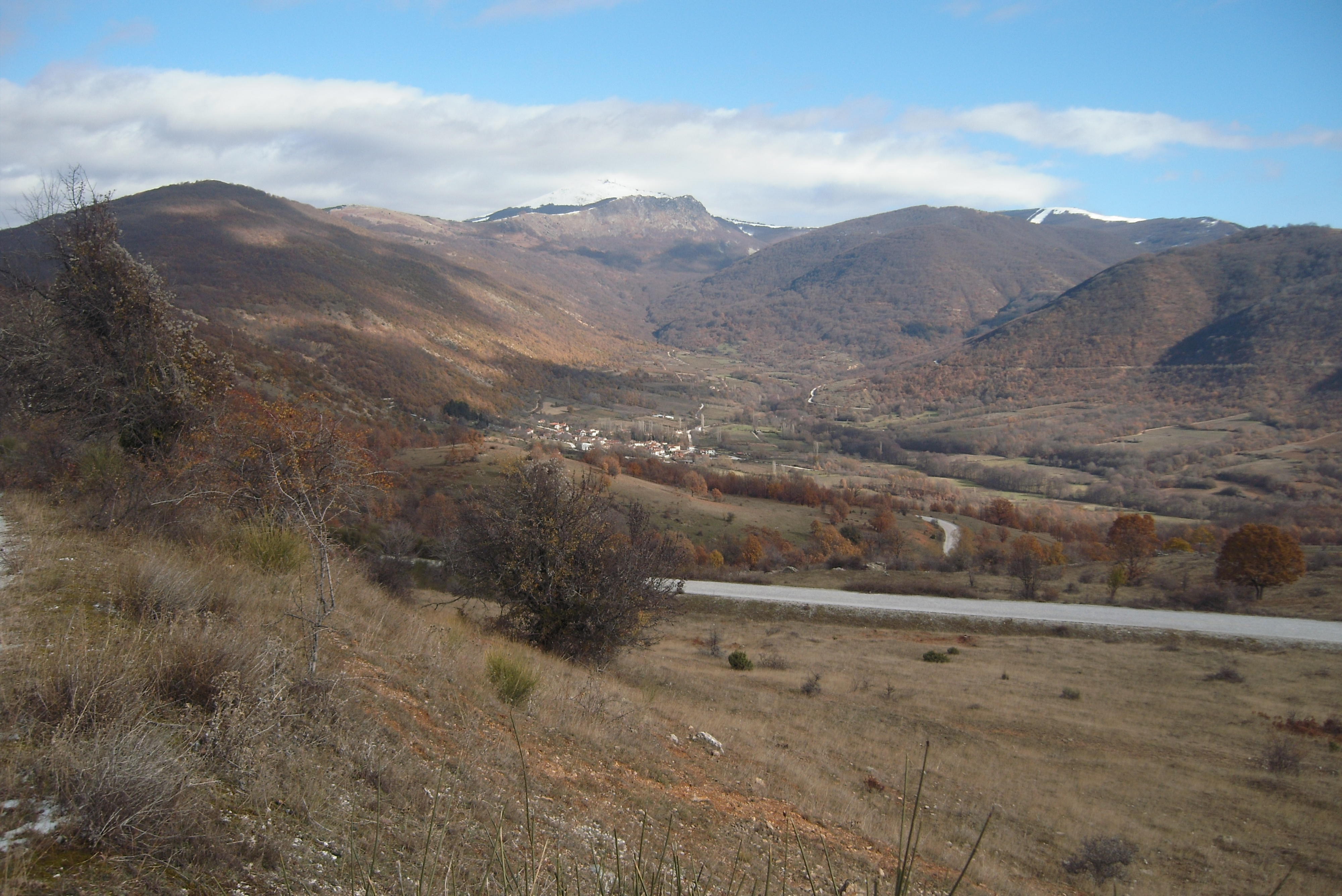 Вишени и Вич